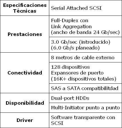 Tabla de especificaciones SAS